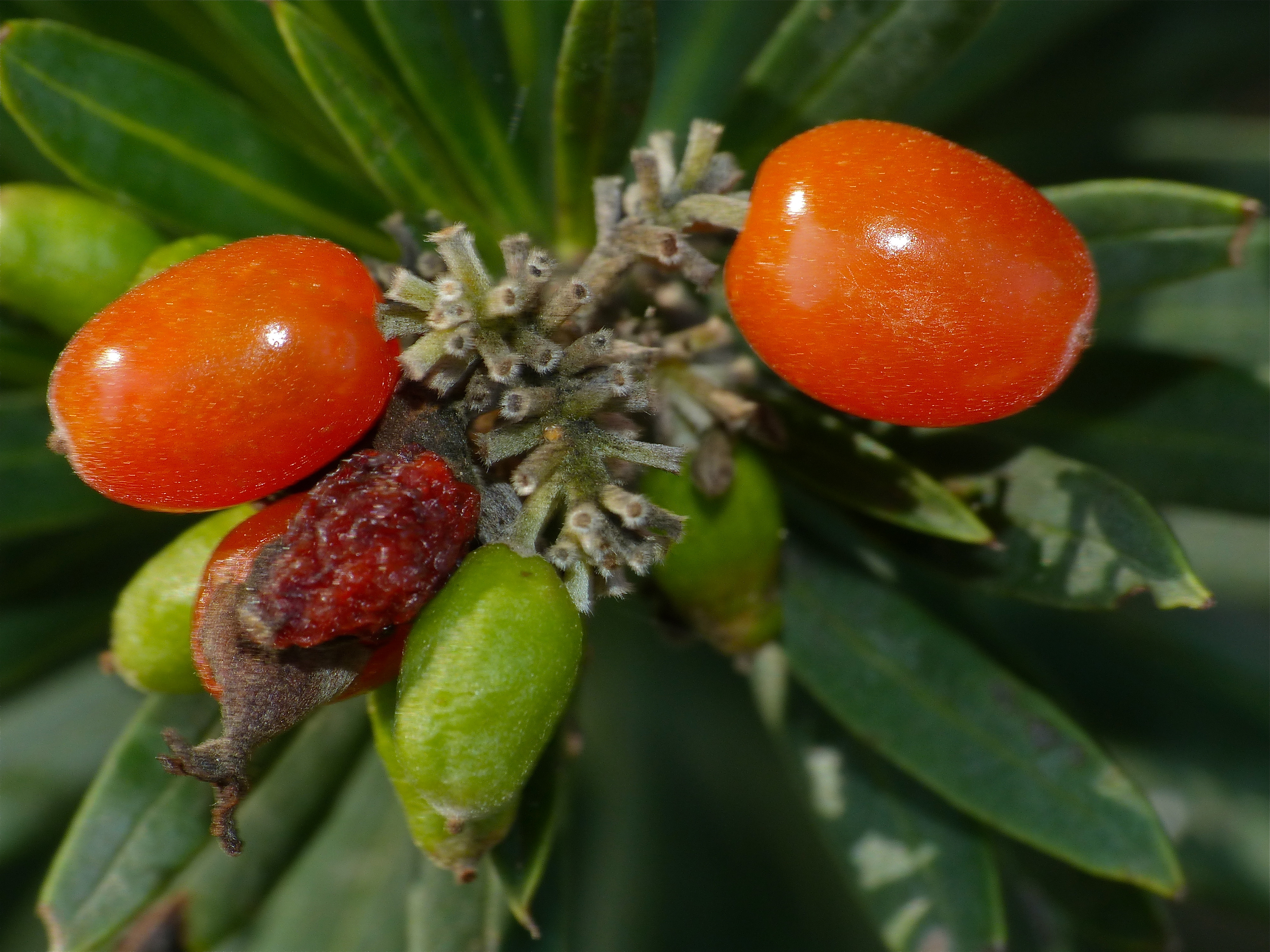 Valcrose, Aniane, Hérault, FRANCE